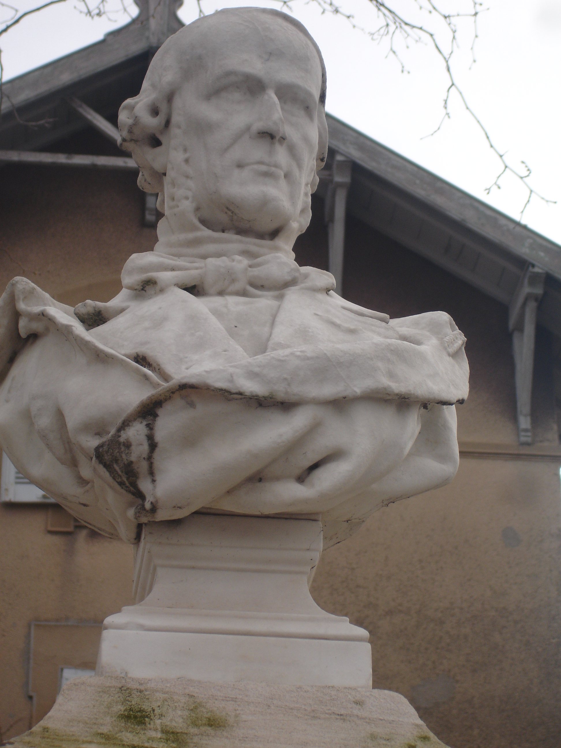 Charles-François Bailly (1844-1914), Buste de Simon Saint Jean (1884), peintre et maire de Millery, Millery (Rhône).